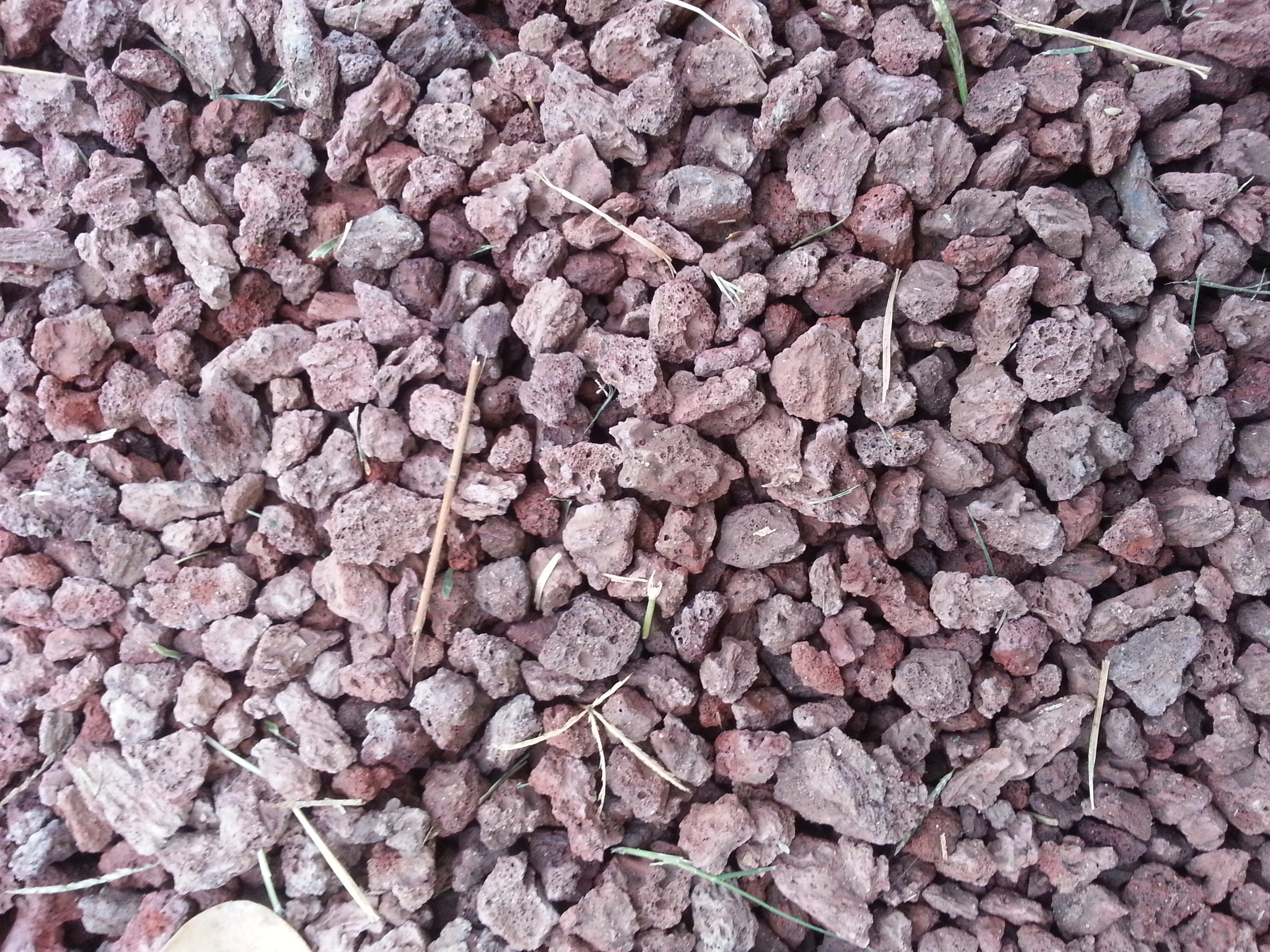 אבני סקוריה אדומה